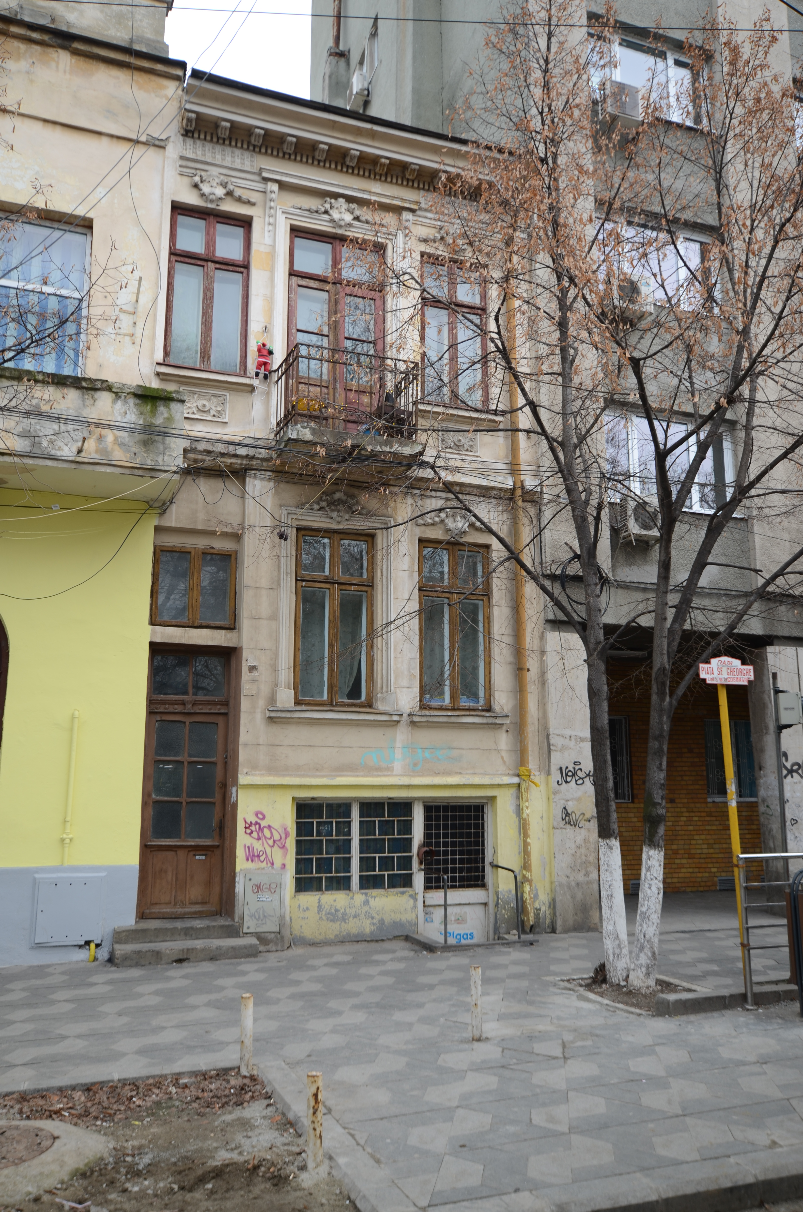 Casă, Str. Cavafii Vechi nr. 13, București